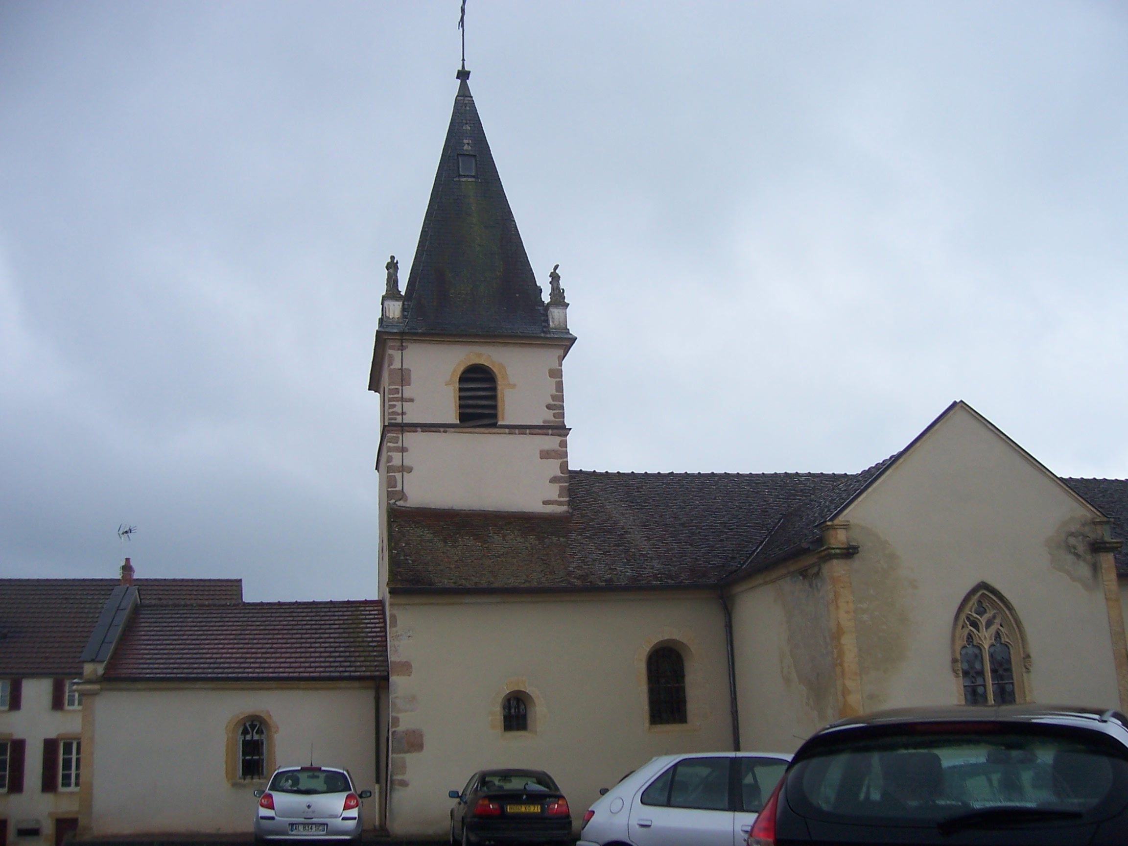 Eglise de Saint-Aubin-en-Charollais